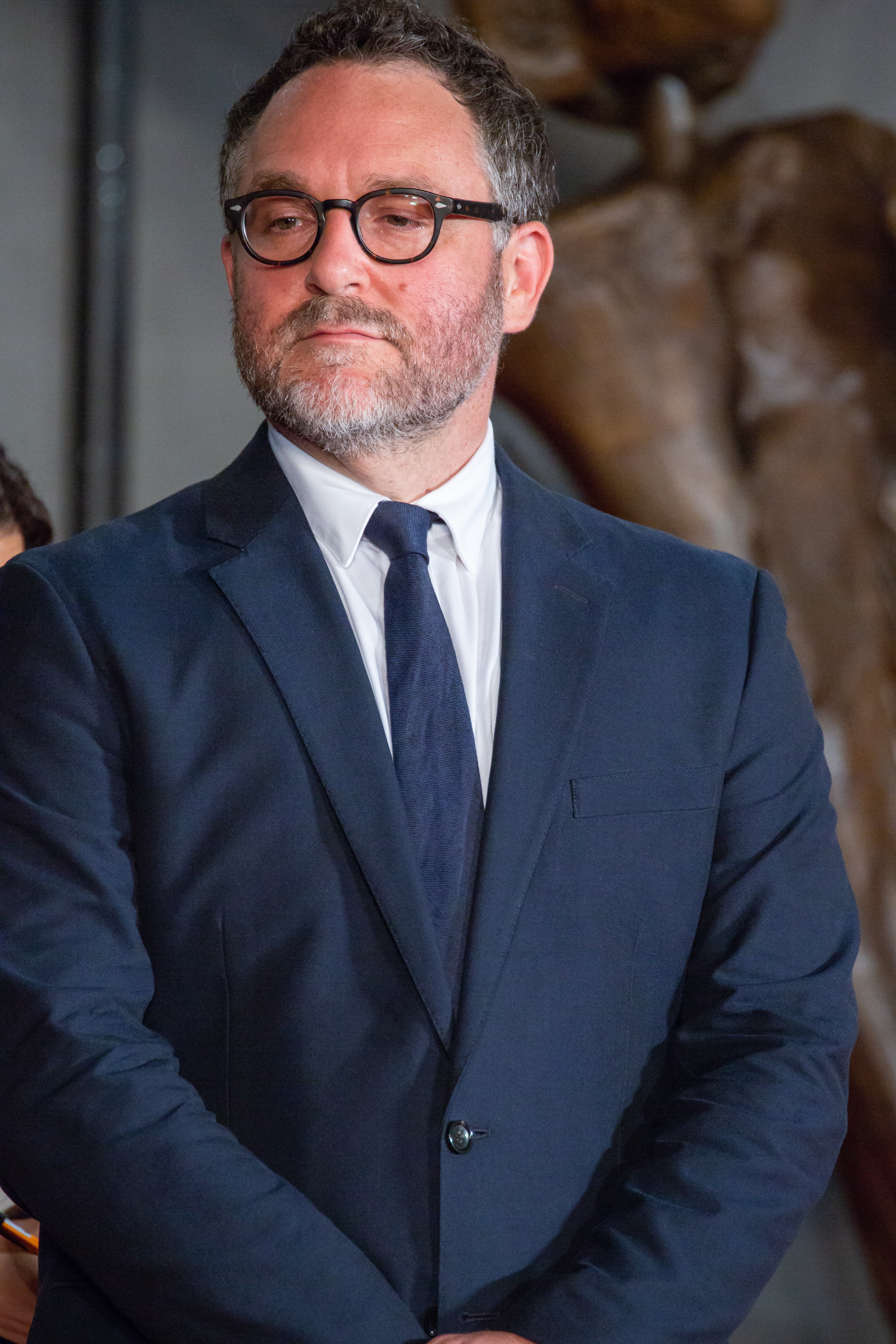 ジュラシック・ワールド/炎の王国 ジャパン・プレミア レッドカーペット コリン・トレヴォロウ